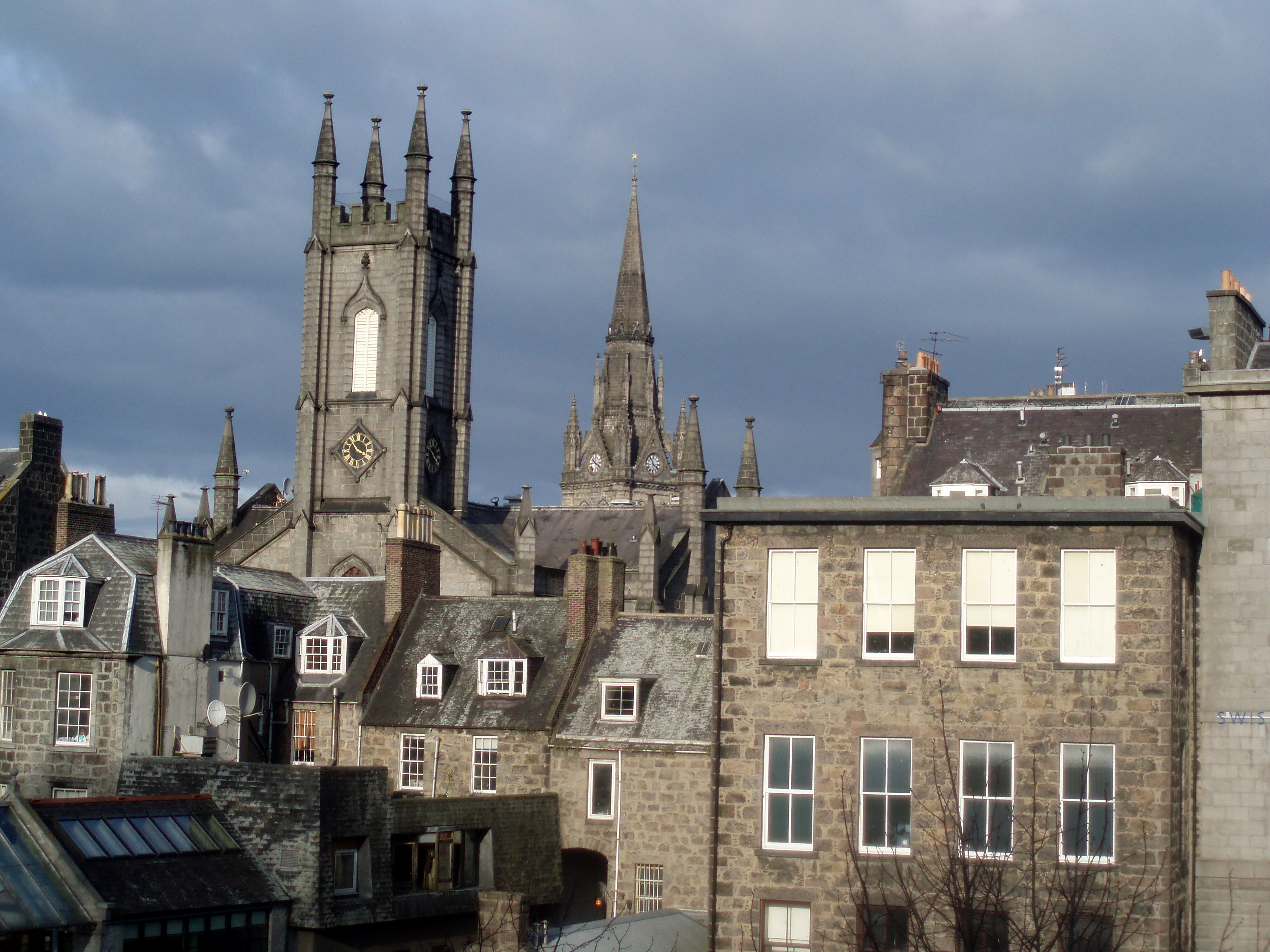 Grijze gebouwen in Aberdeen.